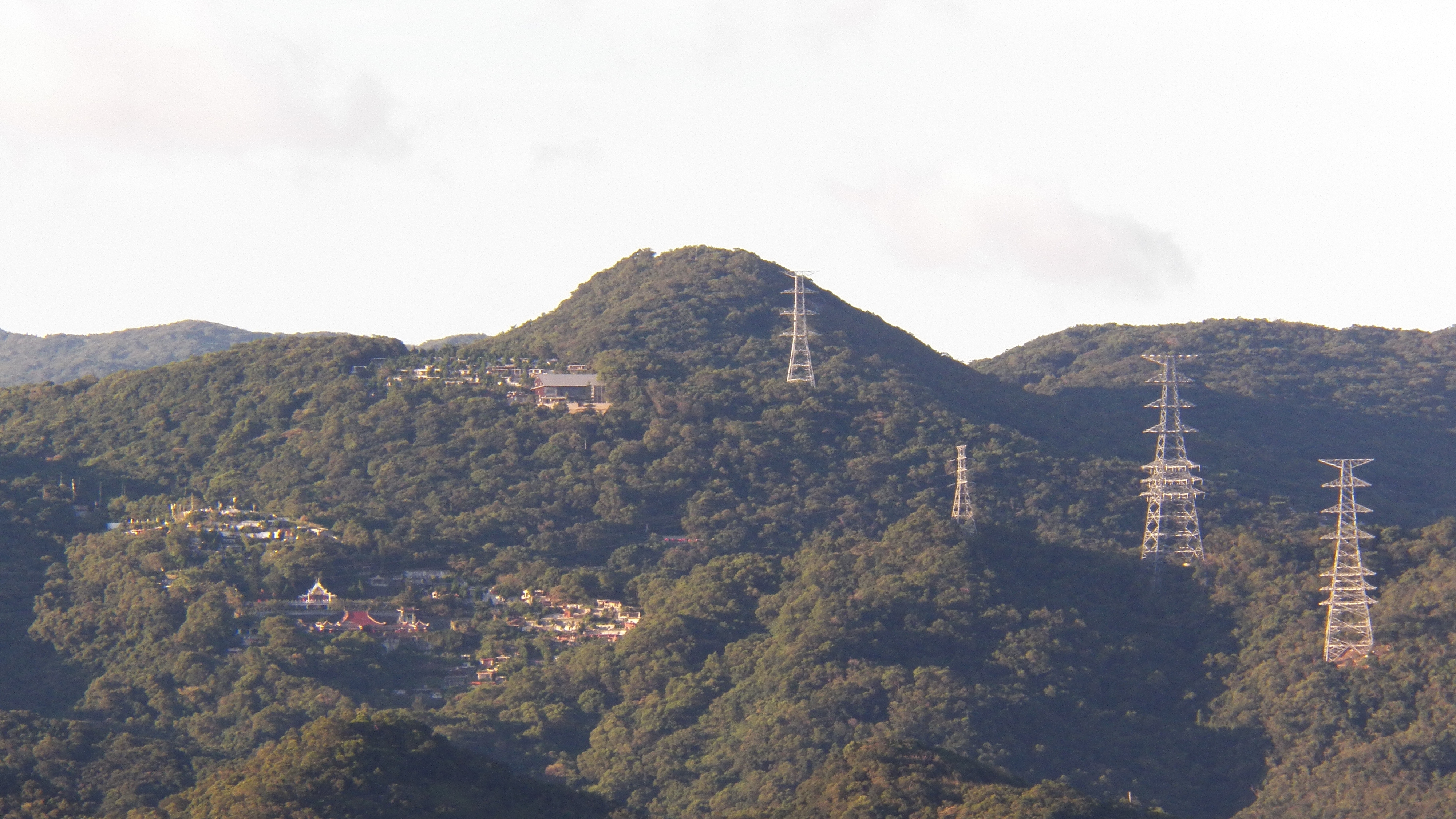 黃昏時，臺北市內湖區大崙頭山的墓園與高壓電輸電塔。